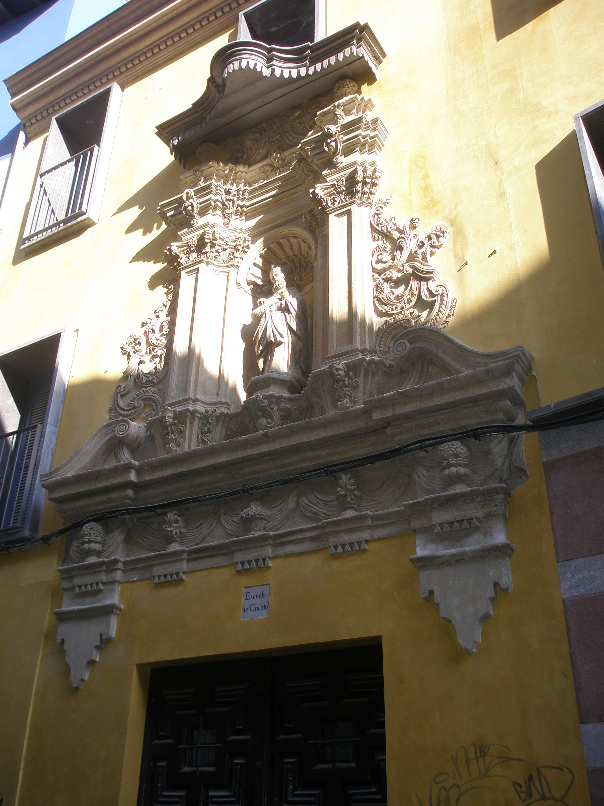 Oratorio de San Felipe Neri de Pamplona